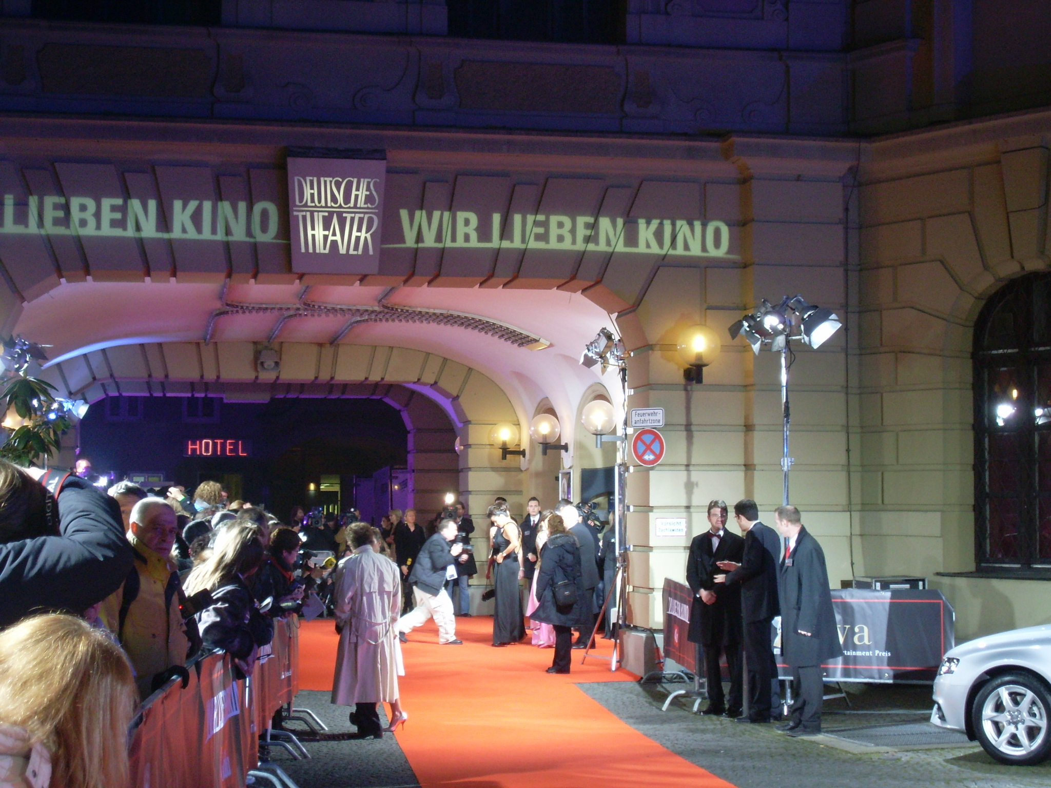 Diva 2008 at Deutsches Theater München, Germany